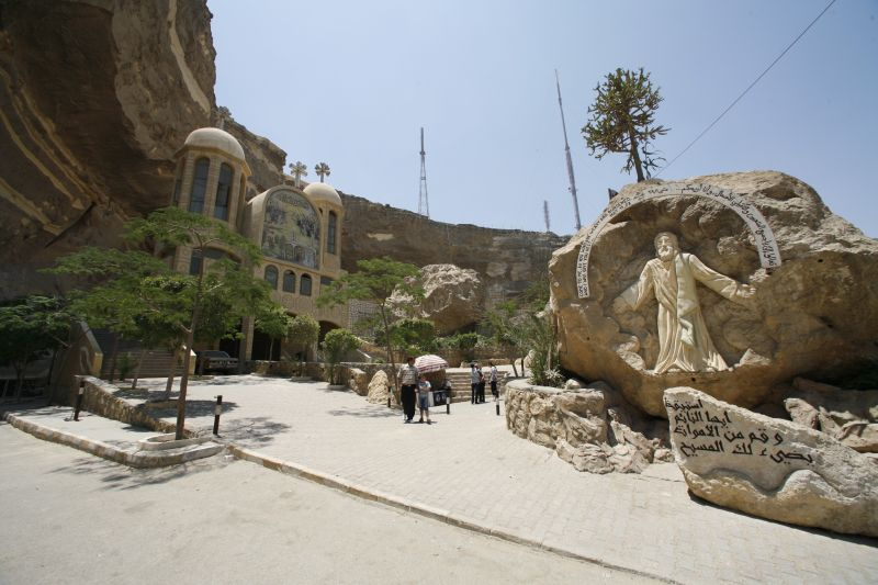 Христианский коптский квартал «Город мусорщиков» в Каире (Египет)